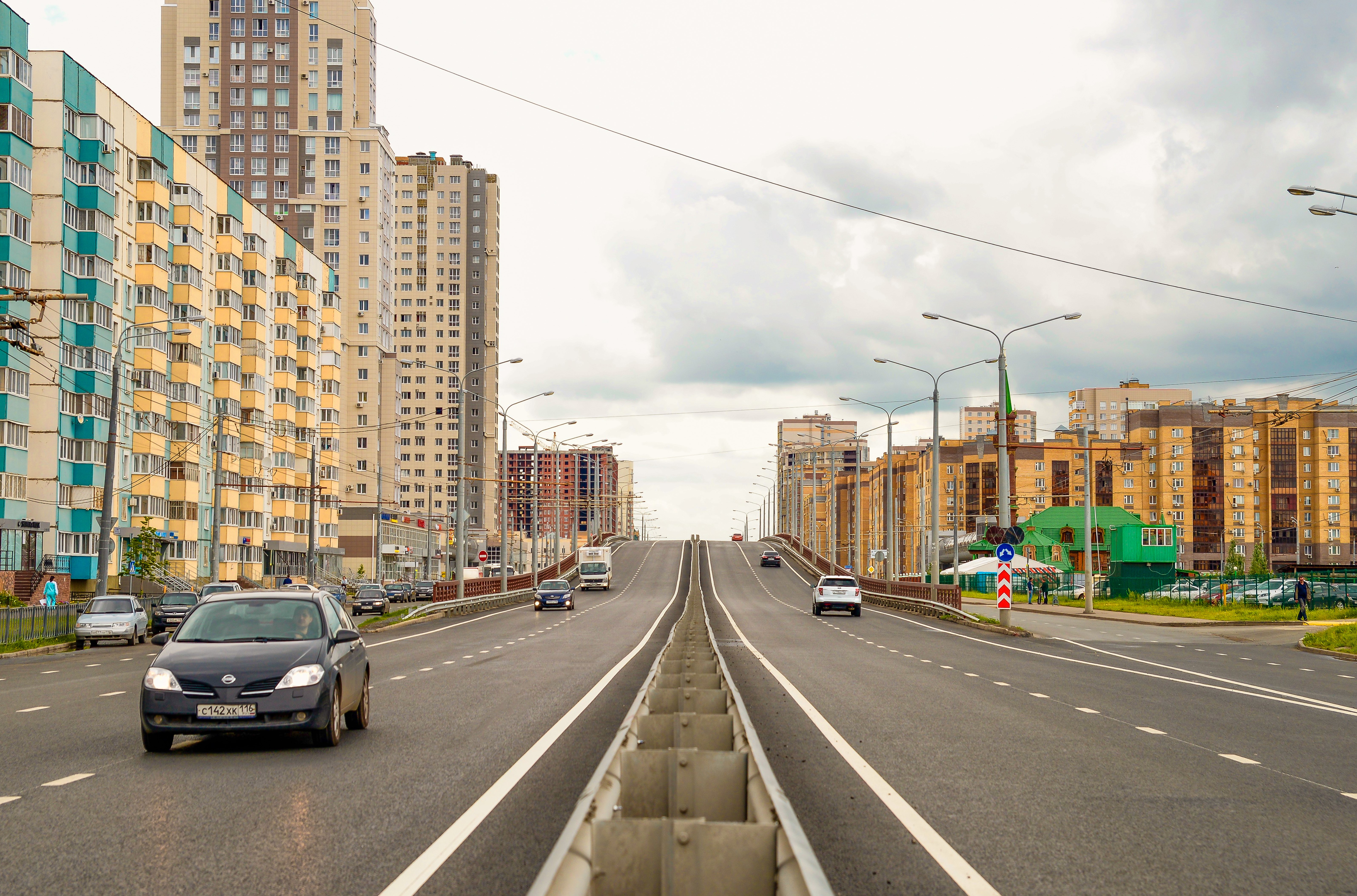 Чистопольская улица в Казани